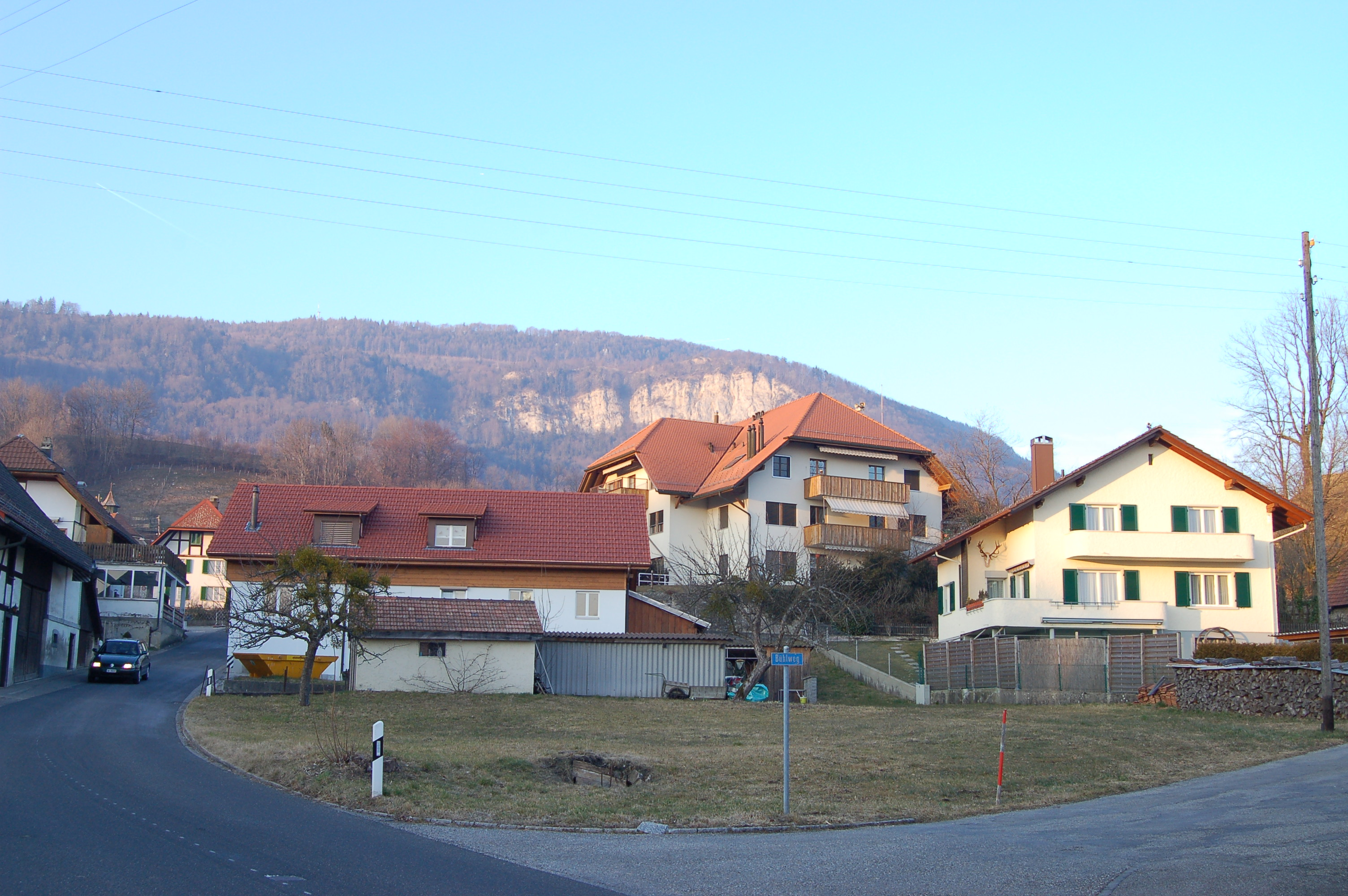 rumisberg